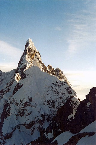 Cordillera Blanca, Áncash - Perú.